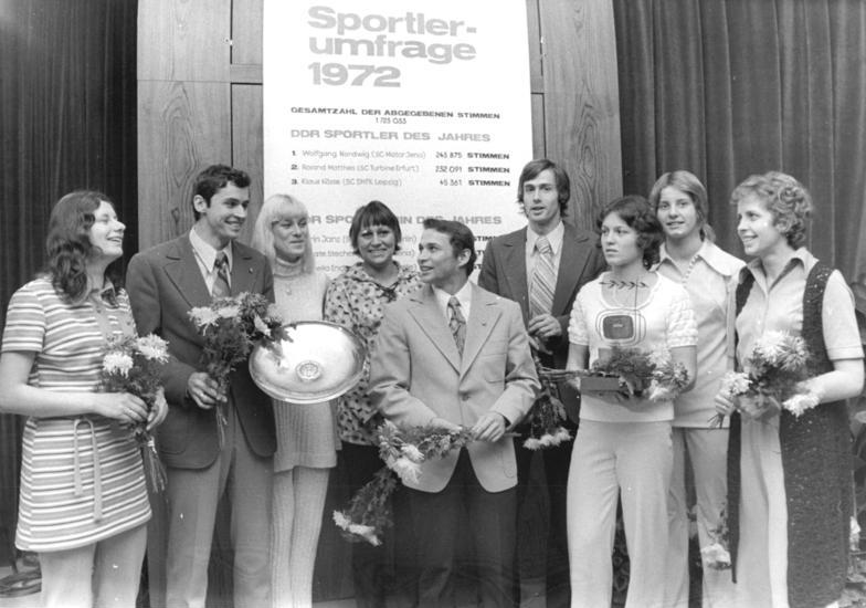 ADN-ZB-Katscherowski-20.12.72-Sue-Berlin :Sportler des Jahres geehrt-Im Kinosaal des Fernsehturms am Alexanderplatz wurden am 20.12.72 die durch die Sportlerumfrage der "Jungen Welt" für 1972 ermittelten "DDR- Sportler des Jahres" geehrt. V.l.n.r.: Helga Seidler, Wolfgang Nordwig, Rita Kühne, Renate Stecher, Klaus Köste, Roland Matthas, Monika Zehrt, Kornelia Ender und Dagmar Luenenschloß-Käsling. (Weiteres siehe ADN-Meldg.)